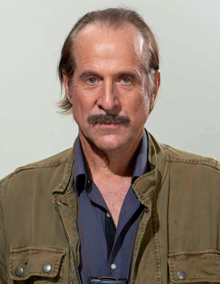 Peter Stormare som "Folke Lundgren" i tv-serien Black Widows på TV3.